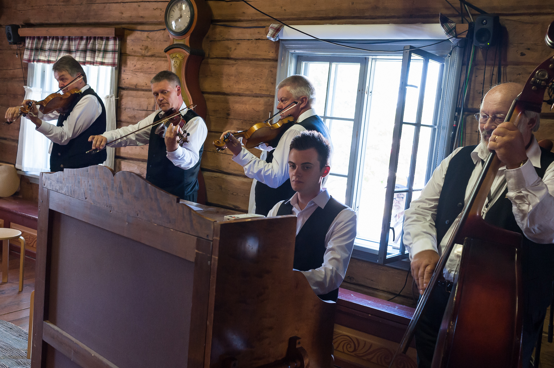 Kaustisen kansanmusiikkijuhlat 2014. Mestarisoitto 11.7.2014 Pelimannitalossa. Purppuripelimannit laajalla kokoonpanolla: vas. Kimmo Anttila, Janne Rauma, Asko Hanhikoski, Ville Uusitalo ja Tapio Kivelä.